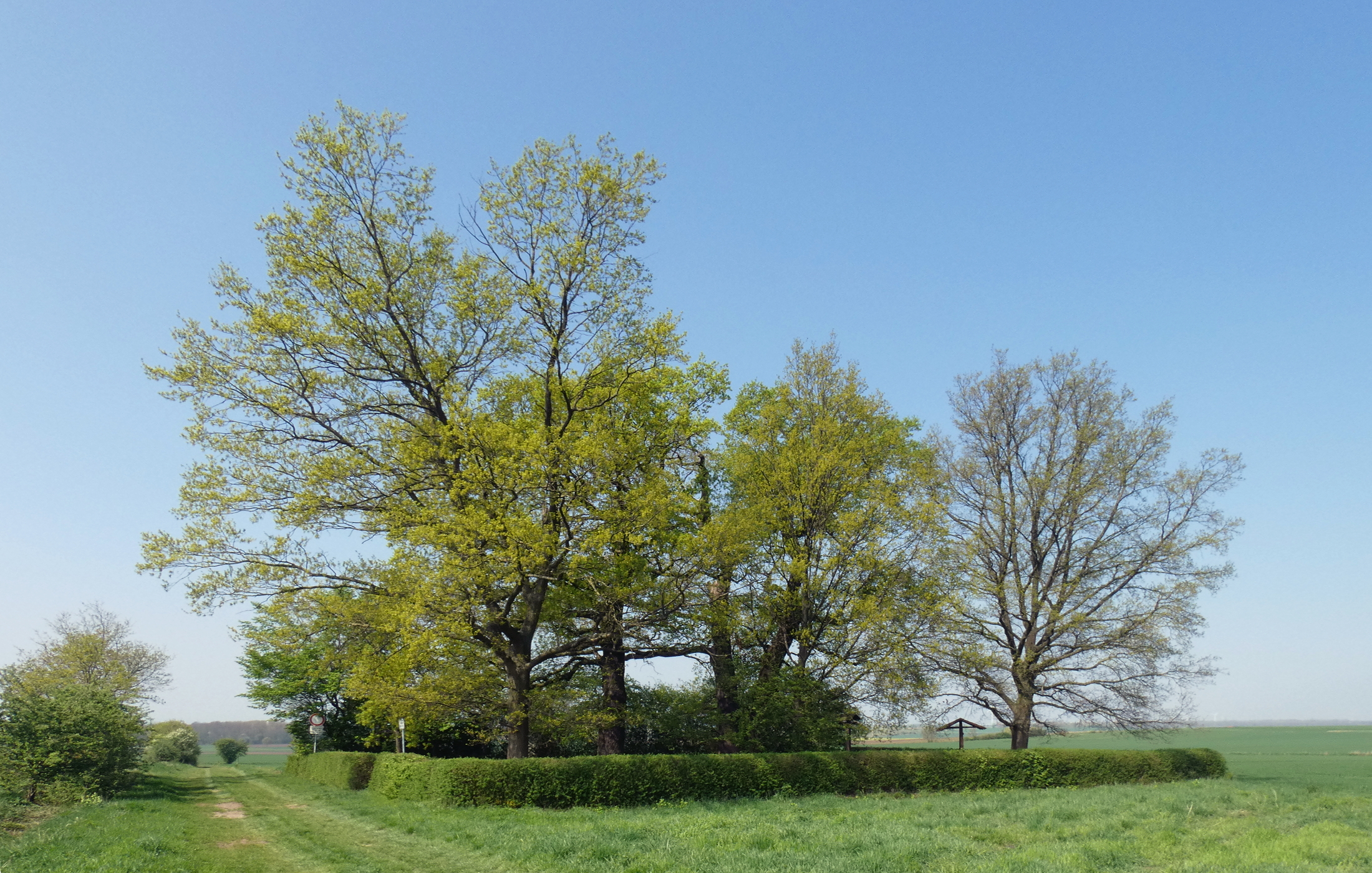 Die Delmer Eichen sind ein Naturdenkmal südlich des Laatzener Stadtteils Ingeln. Sie erinnern an die im 15. Jahrhundert in der Hildesheimer Stiftsfehde wüst gewordene Ortschaft Delm. Der Weg an linken Bildrand markiert die Grenze der Region Hannover zum Landkreis Hildesheim.